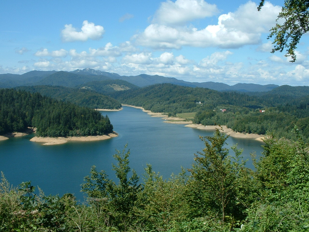 Lake Lokve, near Rijeka